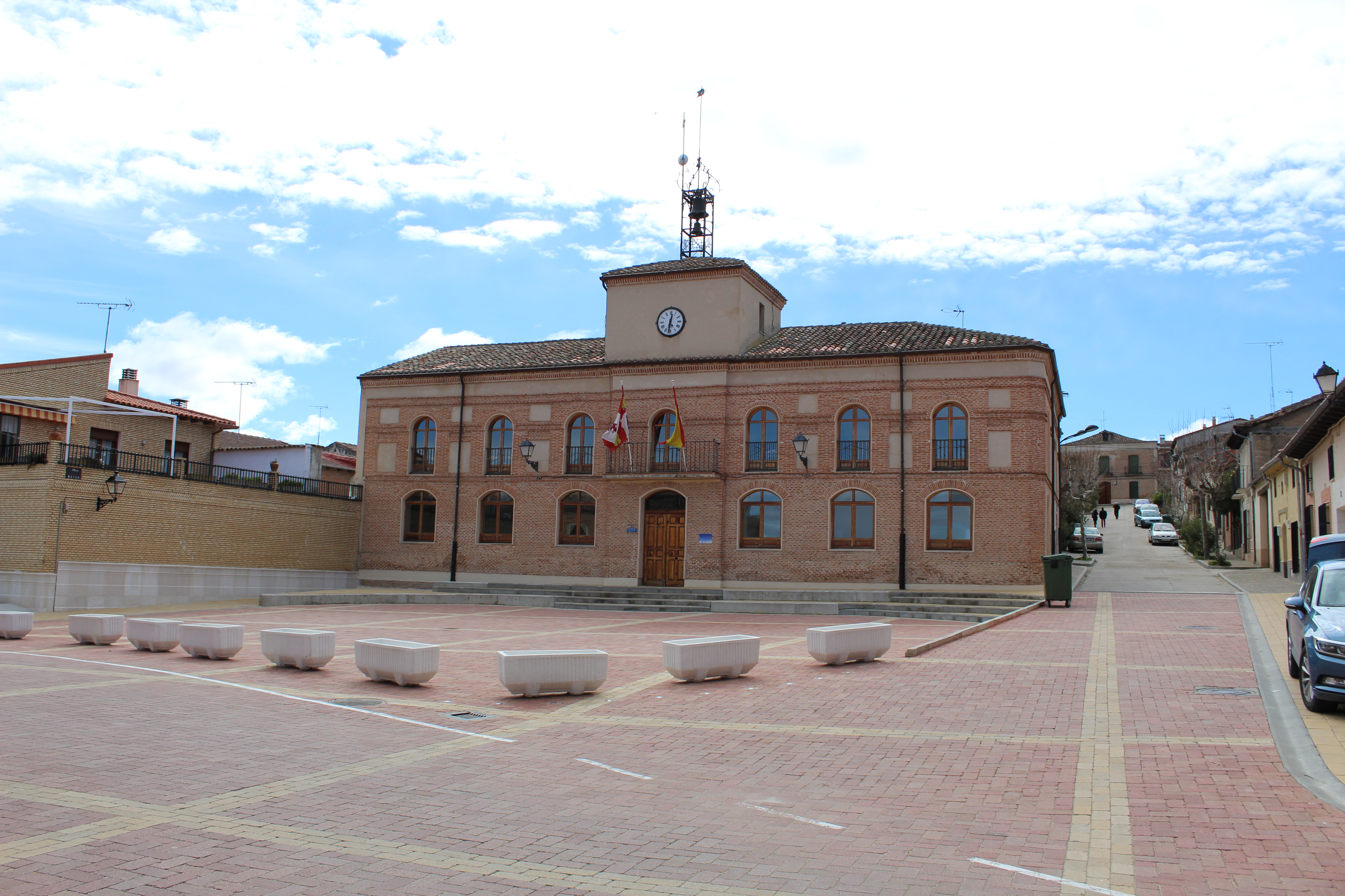 Ayuntamiento y Plaza Mayor de Pollos